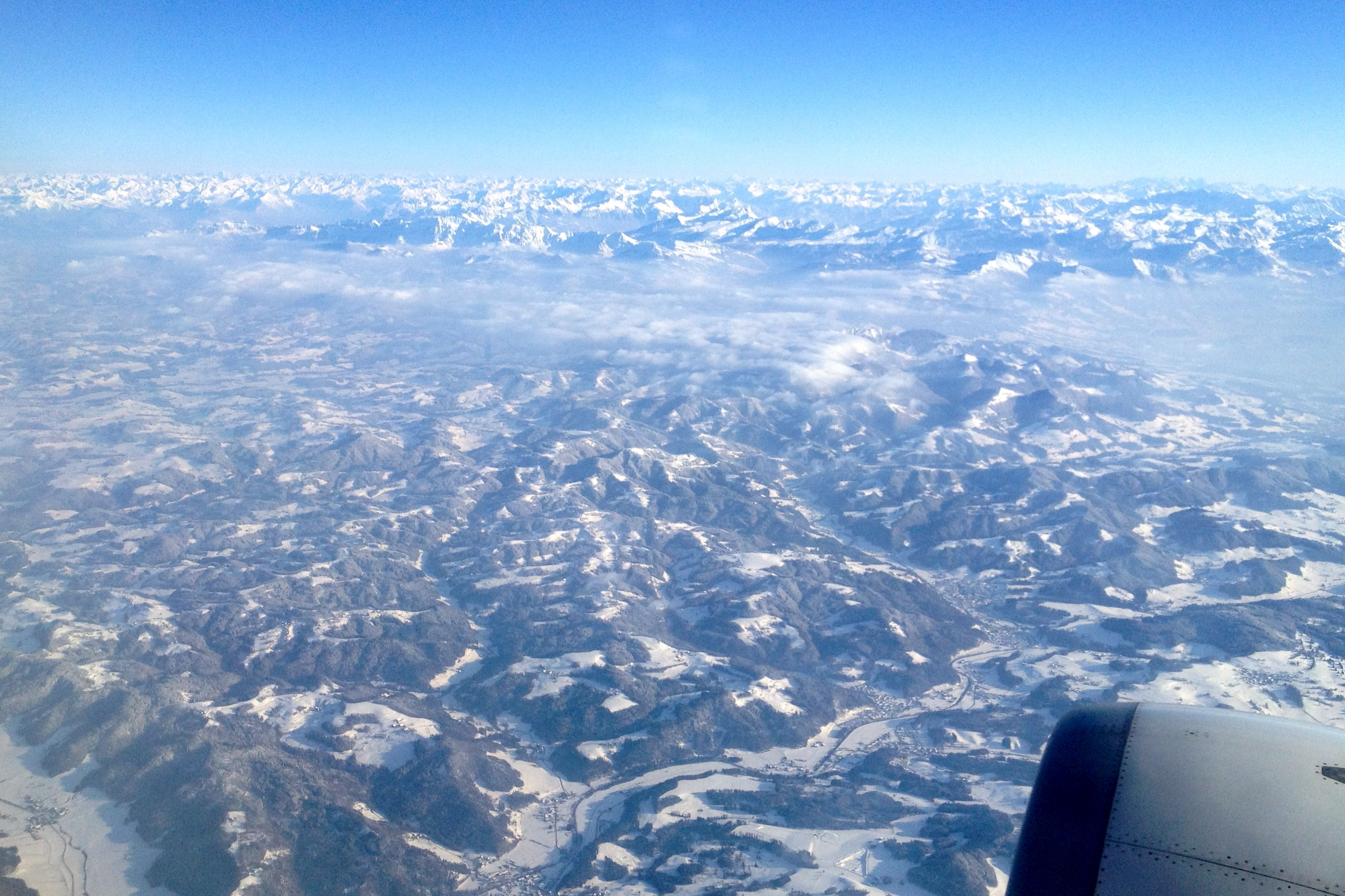 Zürcher Oberland. Links oberhalb des Triebwerks Bauma, links unten Oberhofen